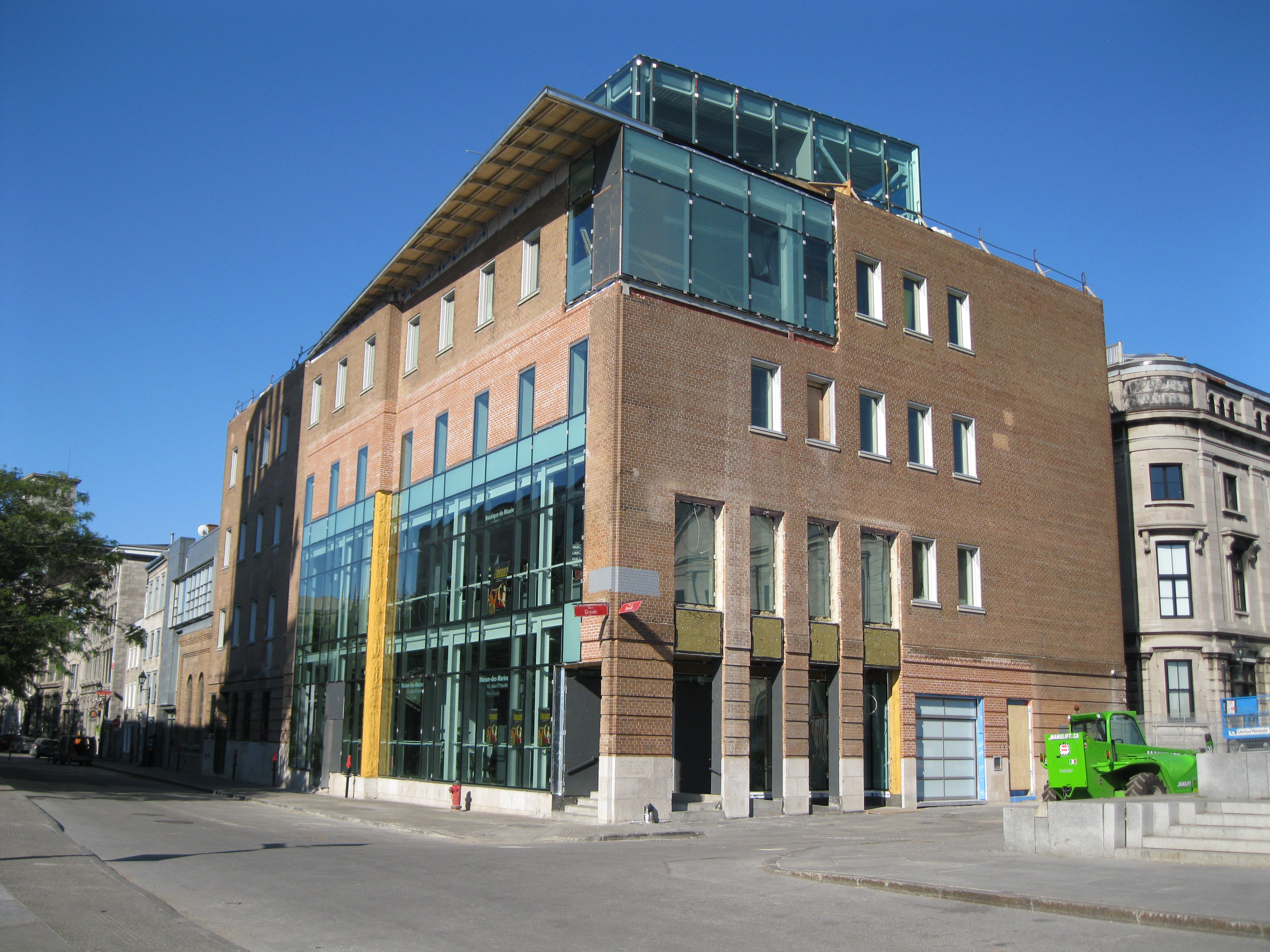 La Maison-des-Marins, 165-169 Place d'Youville, Montréal